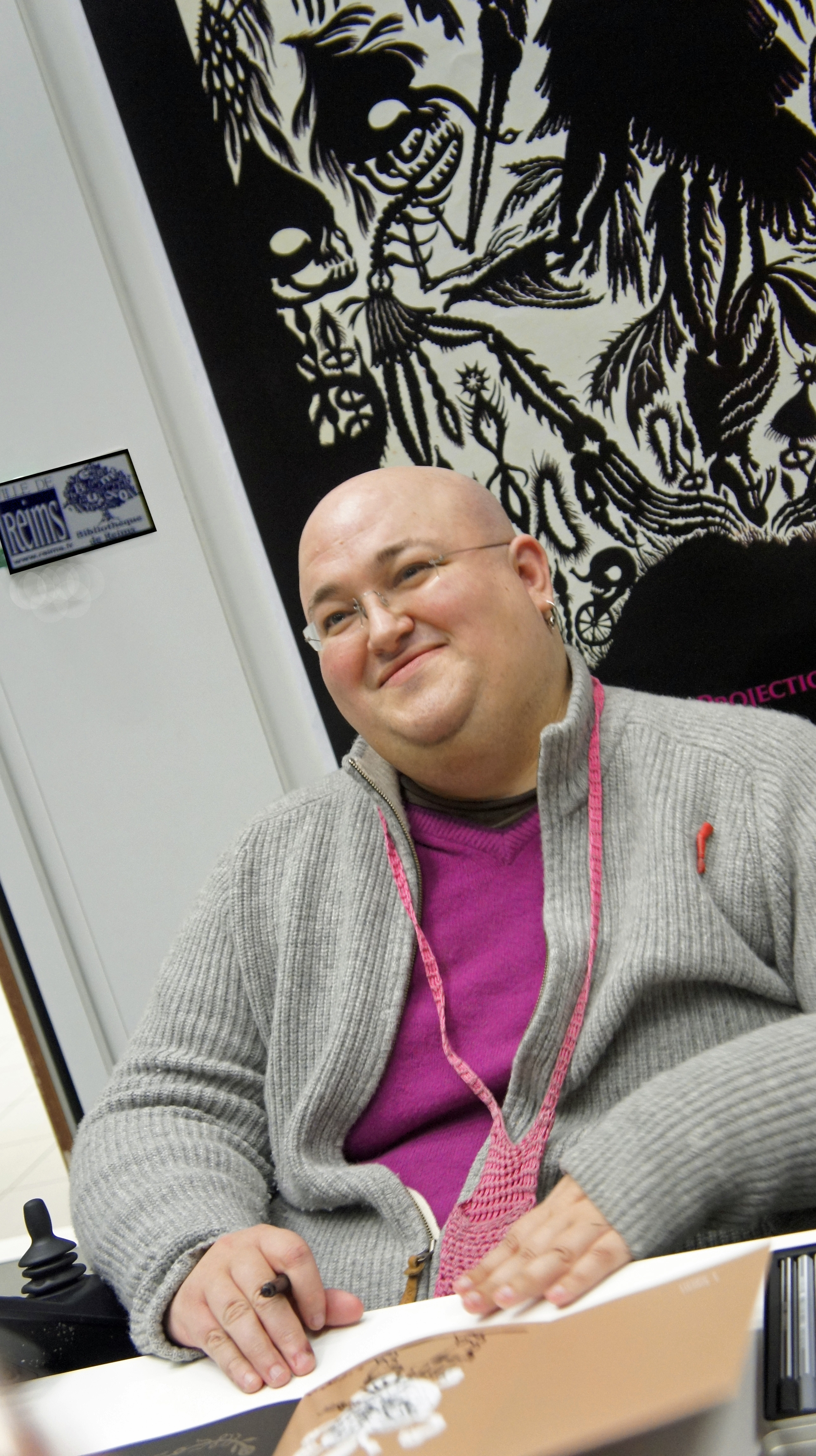 Stéphane Blanquet, exposition multisites Mâchoires Noires, médiathèque Jean Falala en 2012.